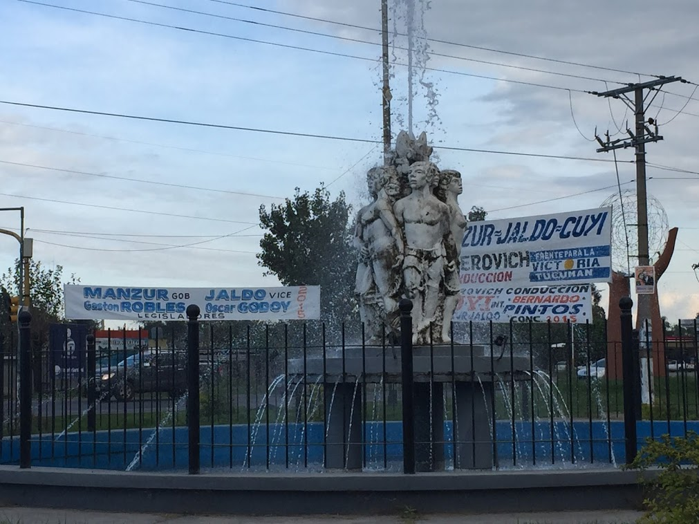 fuente de agua situada en la entrada principal de Monteros, Tucumán